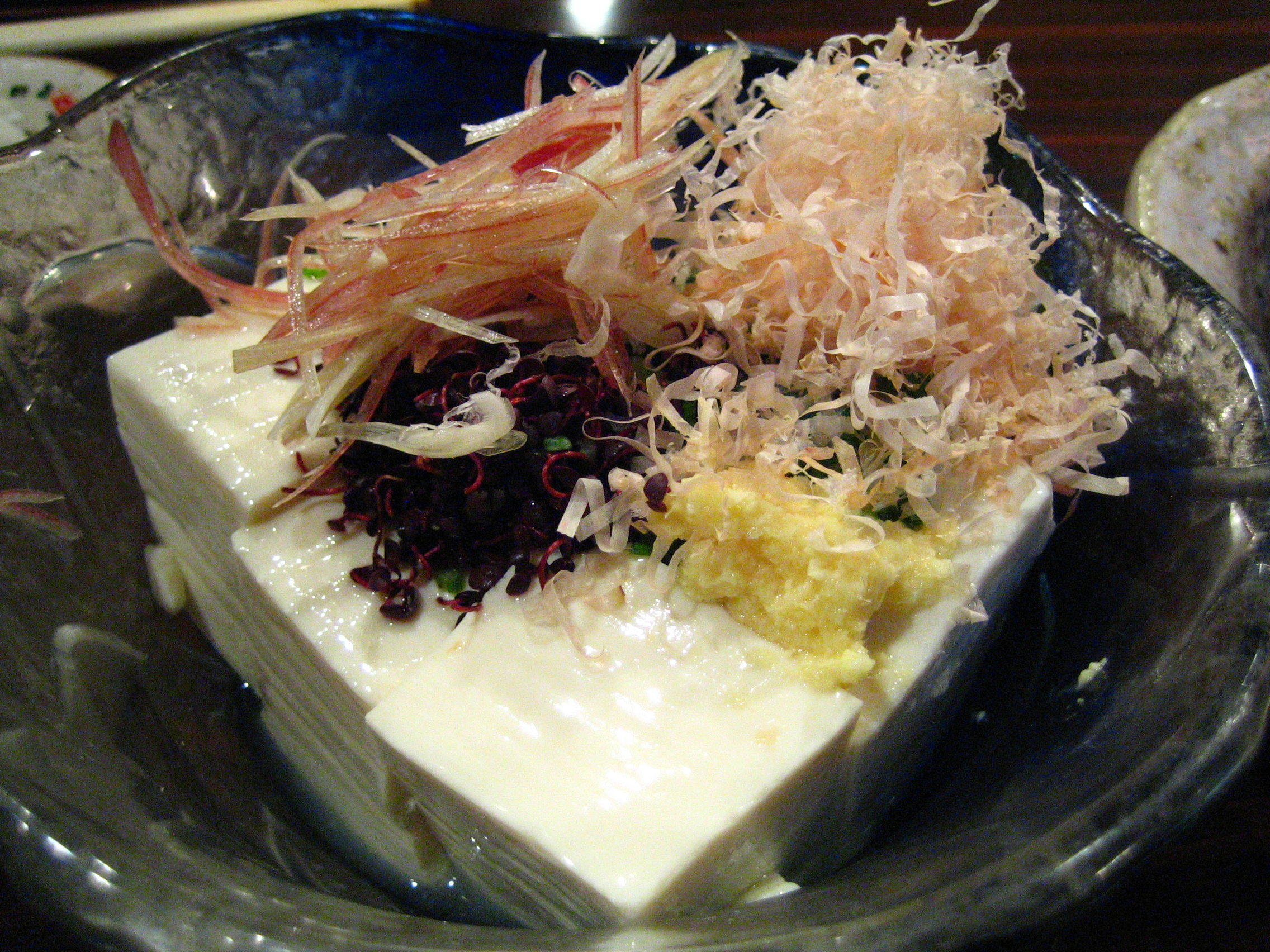 at Umi no Sachi, a seafood izakaya in Monzen Nakacho, Tokyo.